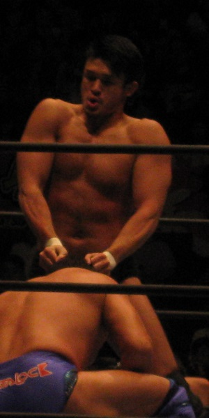 2013年9月29日 神戸大会 「DESTRUCTION」 柴田勝頼